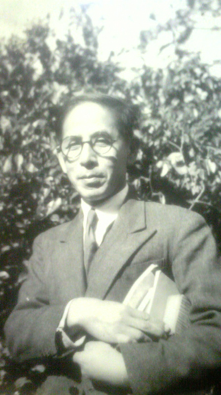 向井寛三郎の肖像